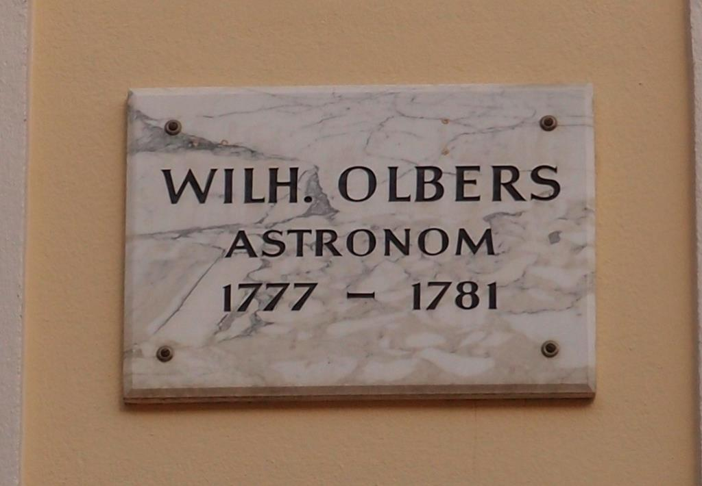 Erinnerung an den Arzt und Astronomen Heinrich Wilhelm Olbers (1758-1840), Göttingen, Weender Straße 48